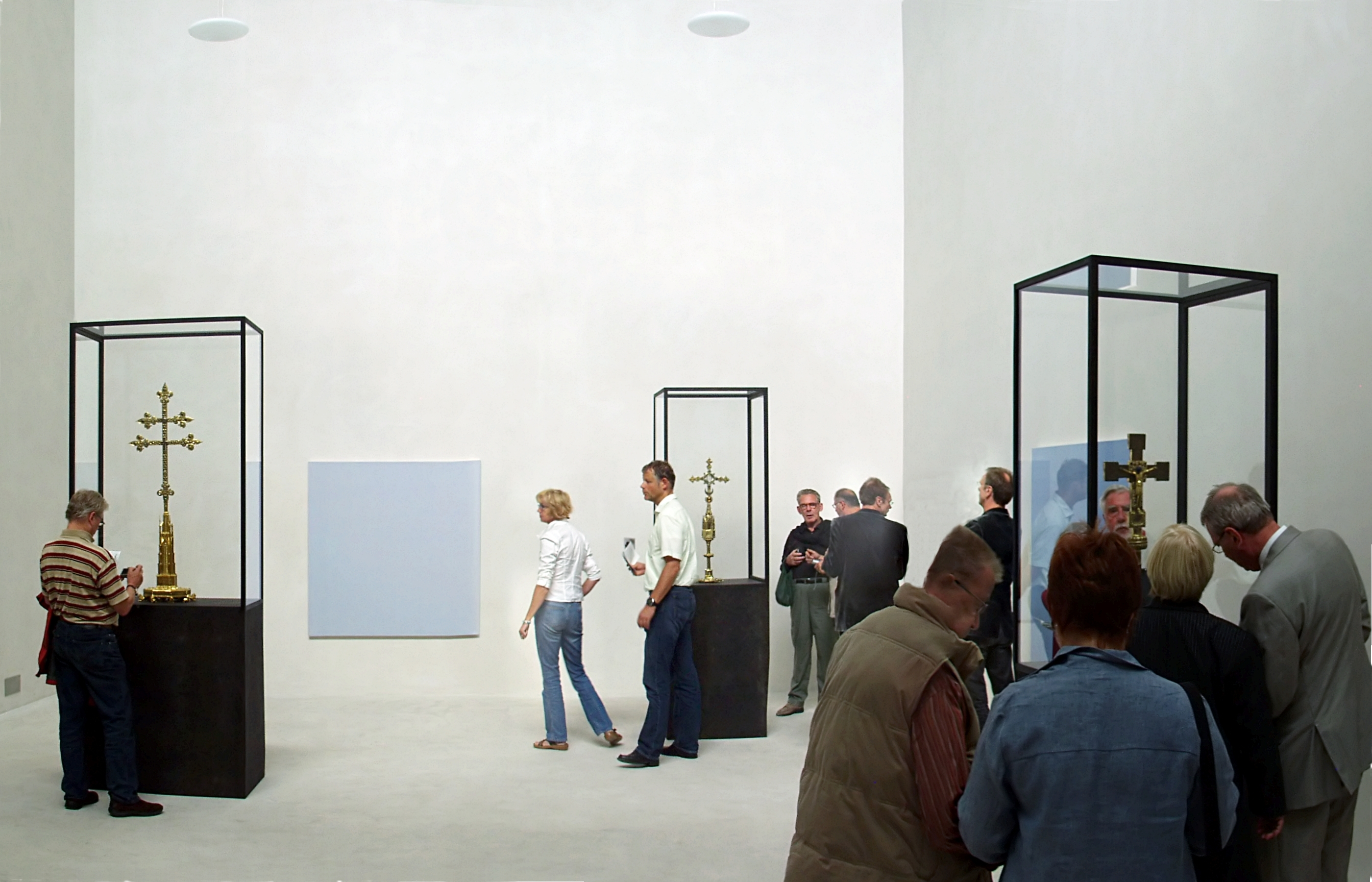 Raum 21 (Südturm) des Kolumba (Museum), Köln. 3 Goldschmiedekreuze, u.a. vorne rechts das Hermann-Ida-Kreuz.